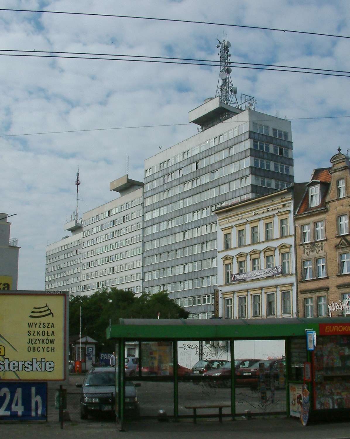 Buldings on Piekary Str. in Poznań